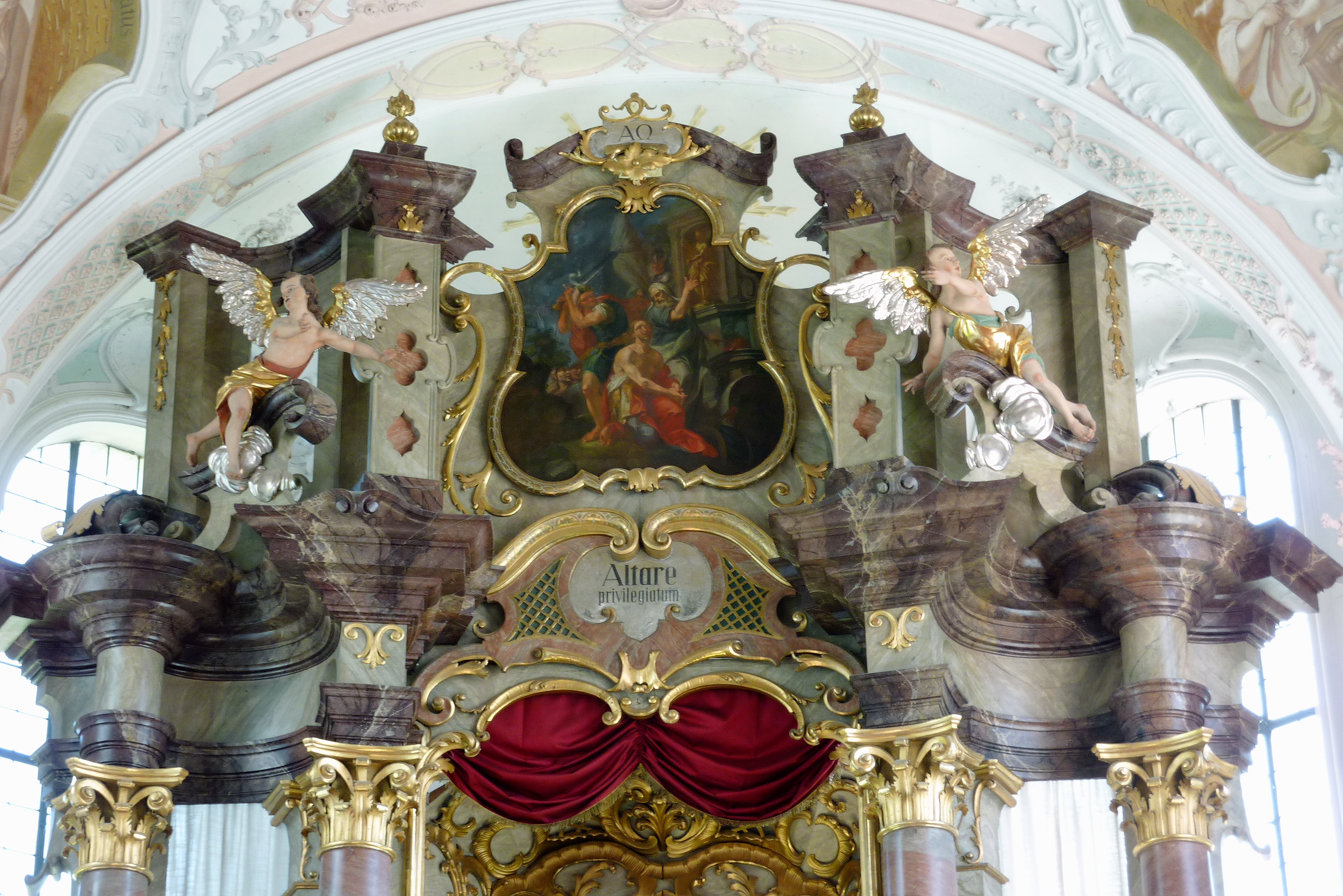 Katholische Pfarrkirche St. Georg in Westendorf, einer Gemeinde im Landkreis Augsburg (Bayern), Hochaltar von 1850; die Engel von Johann Michael Guggenbichel stammen vom Altar von 1673; Auszugsbild (1741) von Johann Georg Wolcker, Darstellung: Enthauptung des hl. Georg